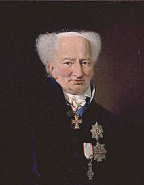 Ernst Heinrich von Schimmelmann (1747-1831), dänischer Politiker.